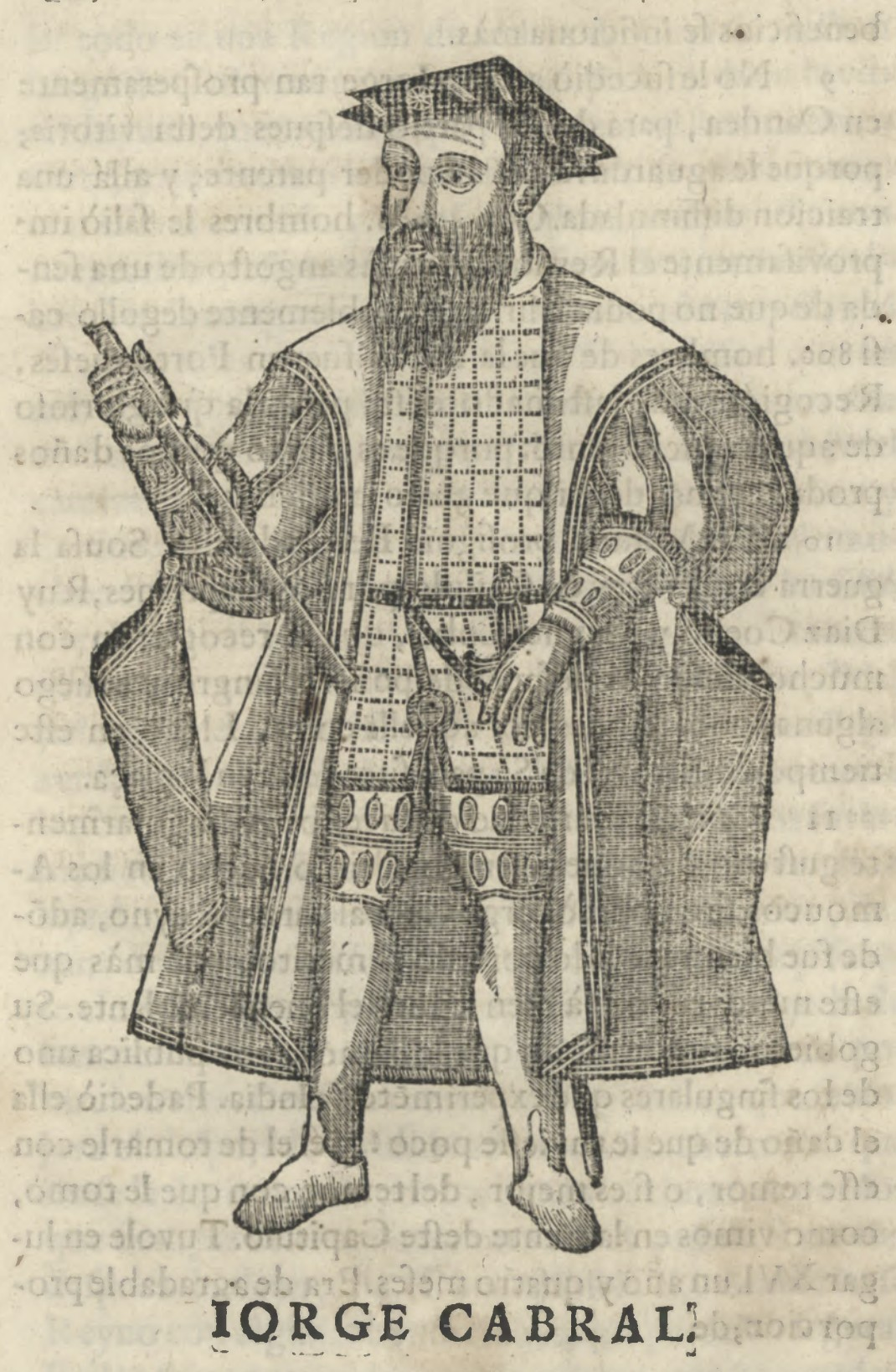 Jorge_Cabral Gouverneur de l'Inde Portugaise